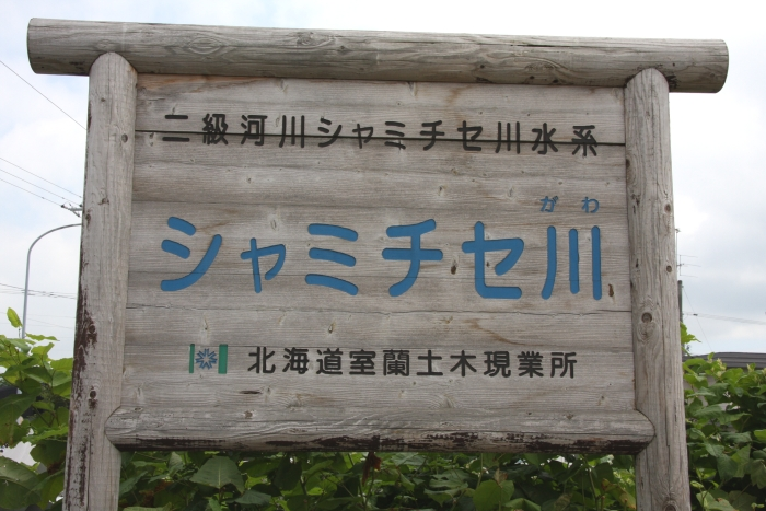 伊達橋にあるシャミチセ川の河川標識